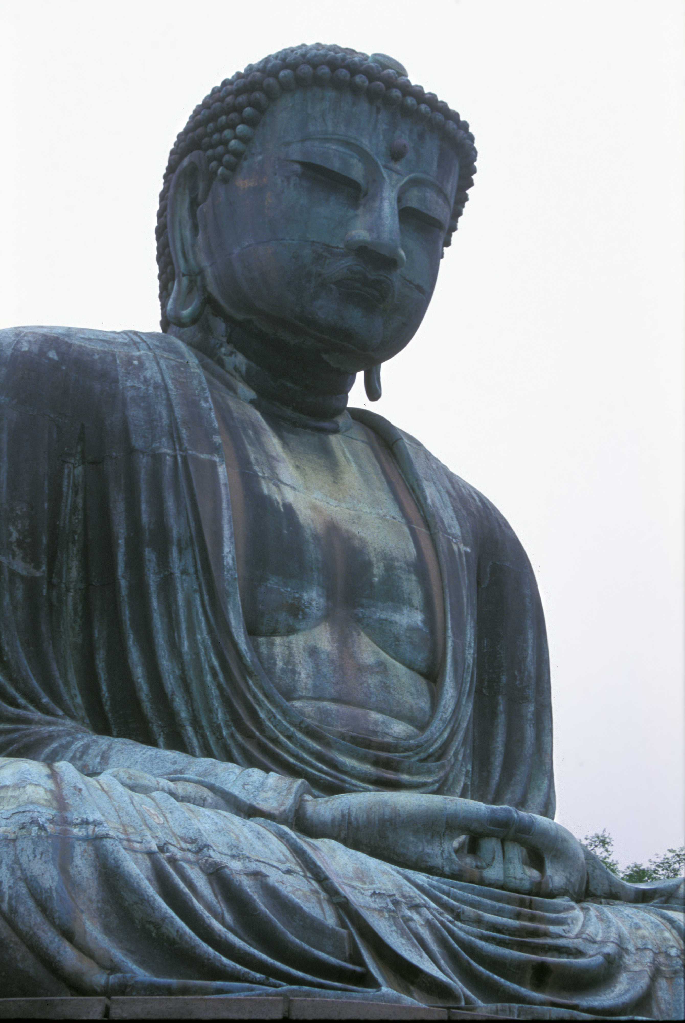 The Great Buddha statue, Kōtoku Temple, Kamakura, Japan